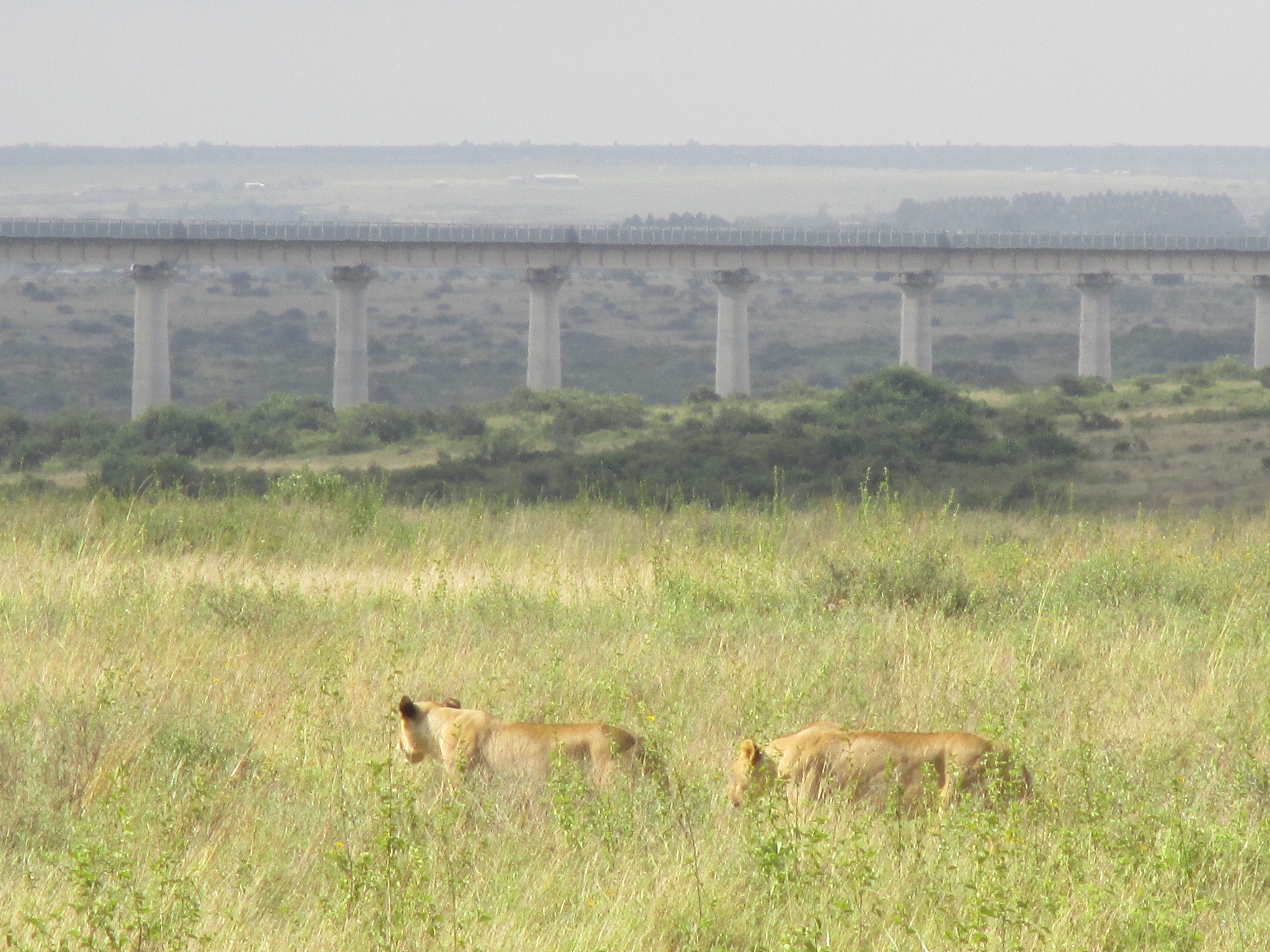 Au premier plan deux lionnes en train de chasser. Sur le second plan, les rails du Madarak express, un train qui relie Nairobi à Mombassa. Malheureusement, ce train passe en plein milieu de la réserve naturelle This is an image with the theme "Africa on the Move or Transport" from: Kenya